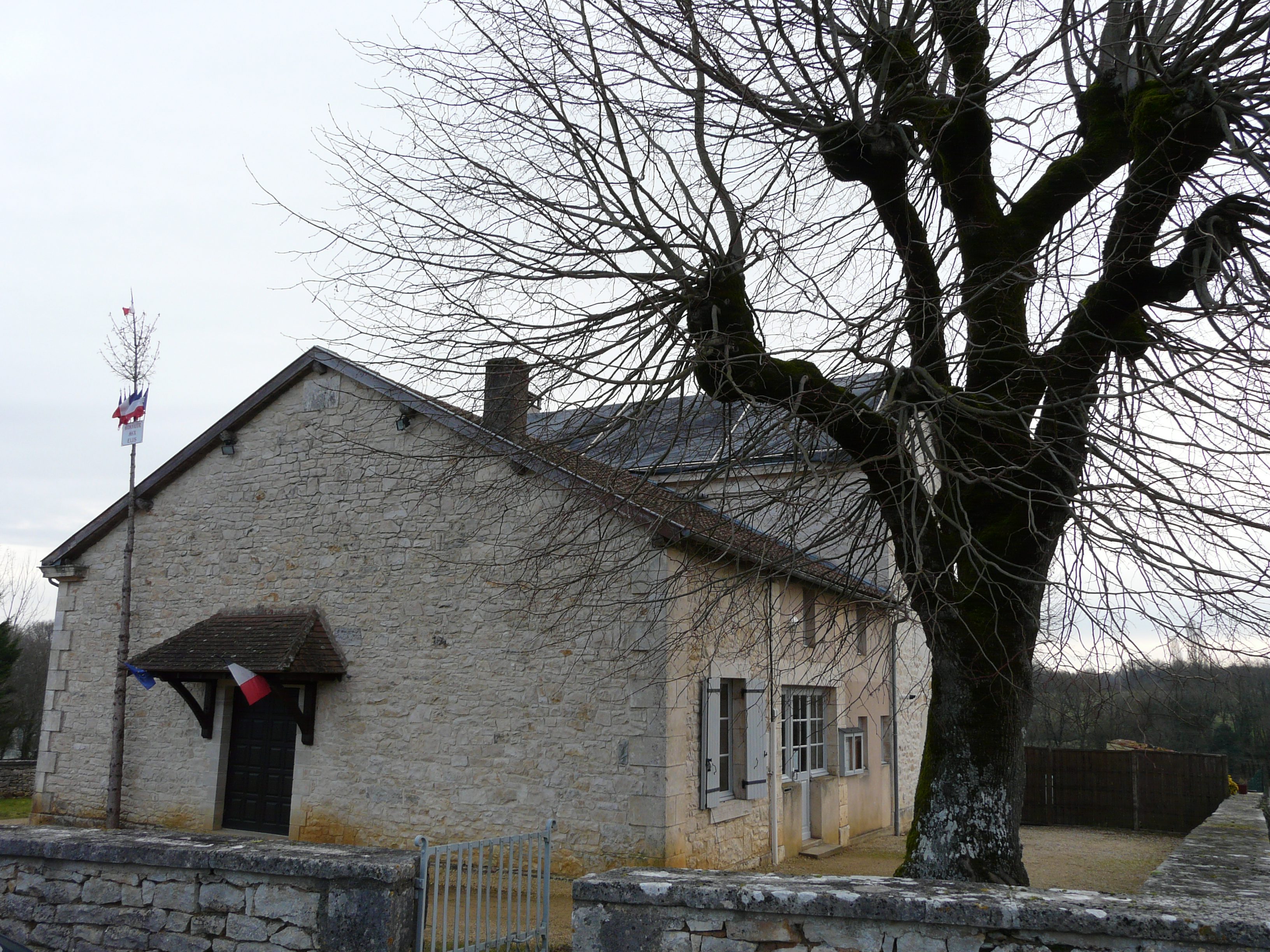 La mairie de Chourgnac, Dordogne, France.